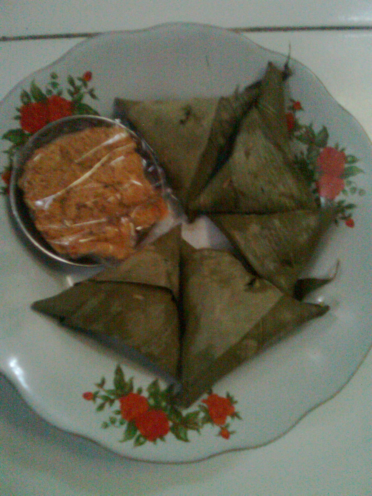 Basa Jawa: Panganan